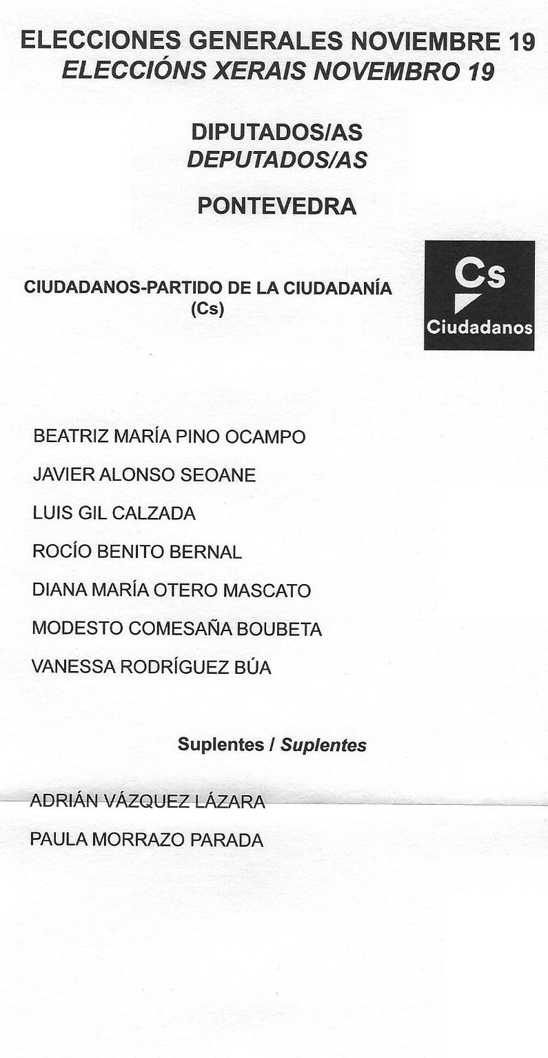 Papeleta electoral de Ciudadanos para o Congreso - Eleccións Xerais de España de novembro de 2019, circunscrición de Pontevedra